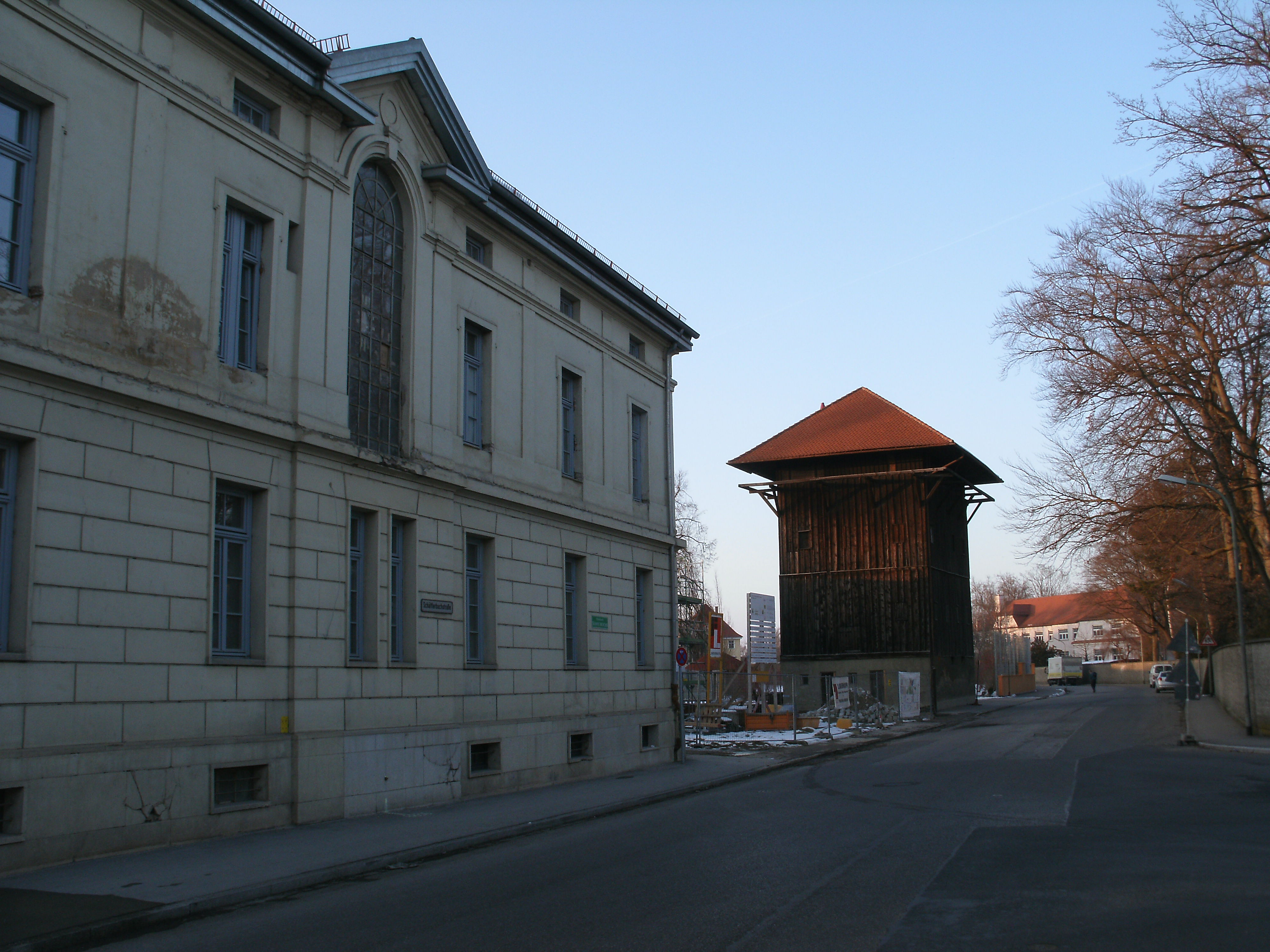 Augsburg, Schäfflerbachstraße 30 (Ehem. Wasch- und Badehaus der Arbeitersiedlung der Kammgarnspinnerei ("Kammgarnquartier") ) mit Färberturm